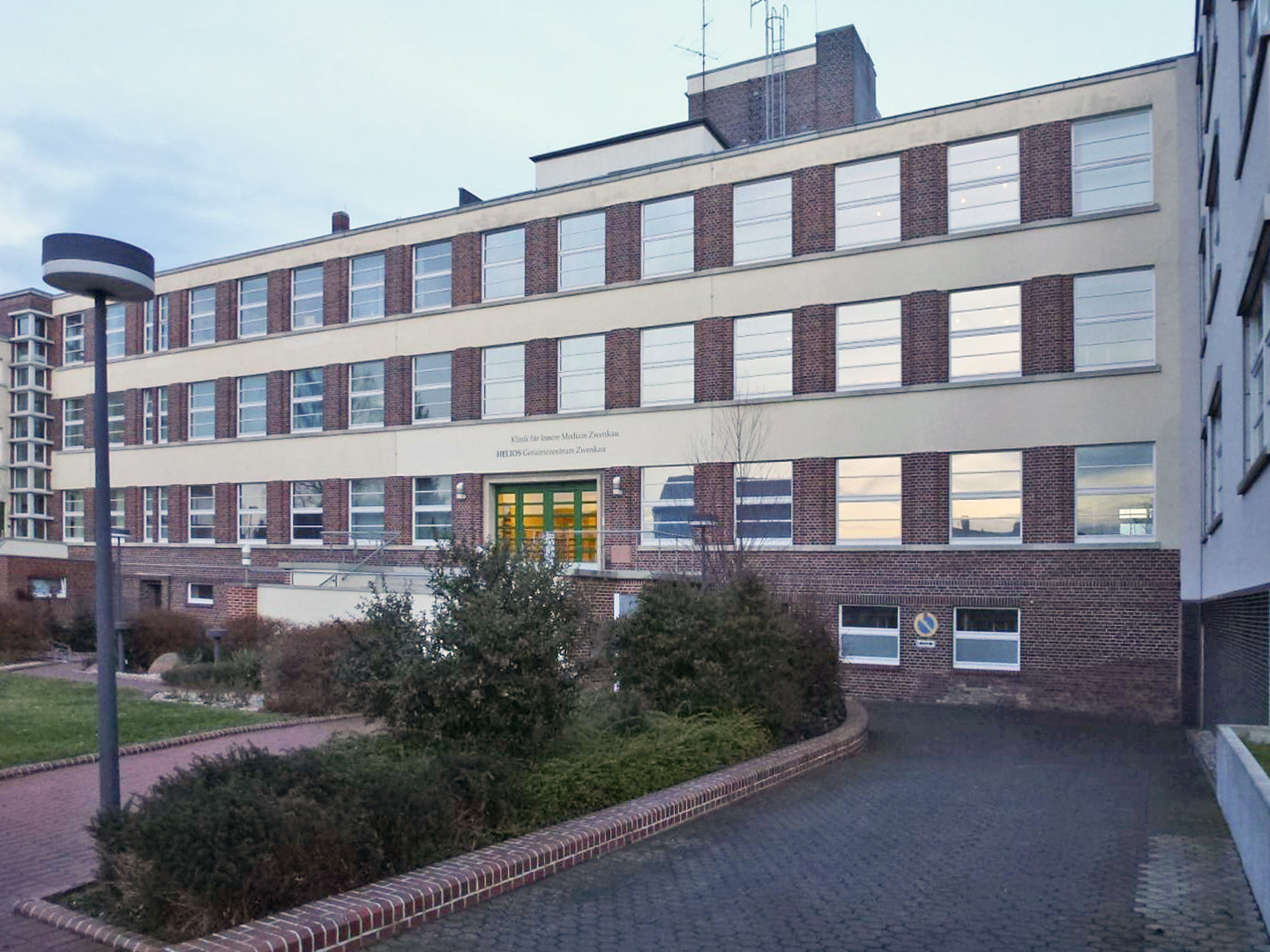 Krankenhaus in Zwenkau